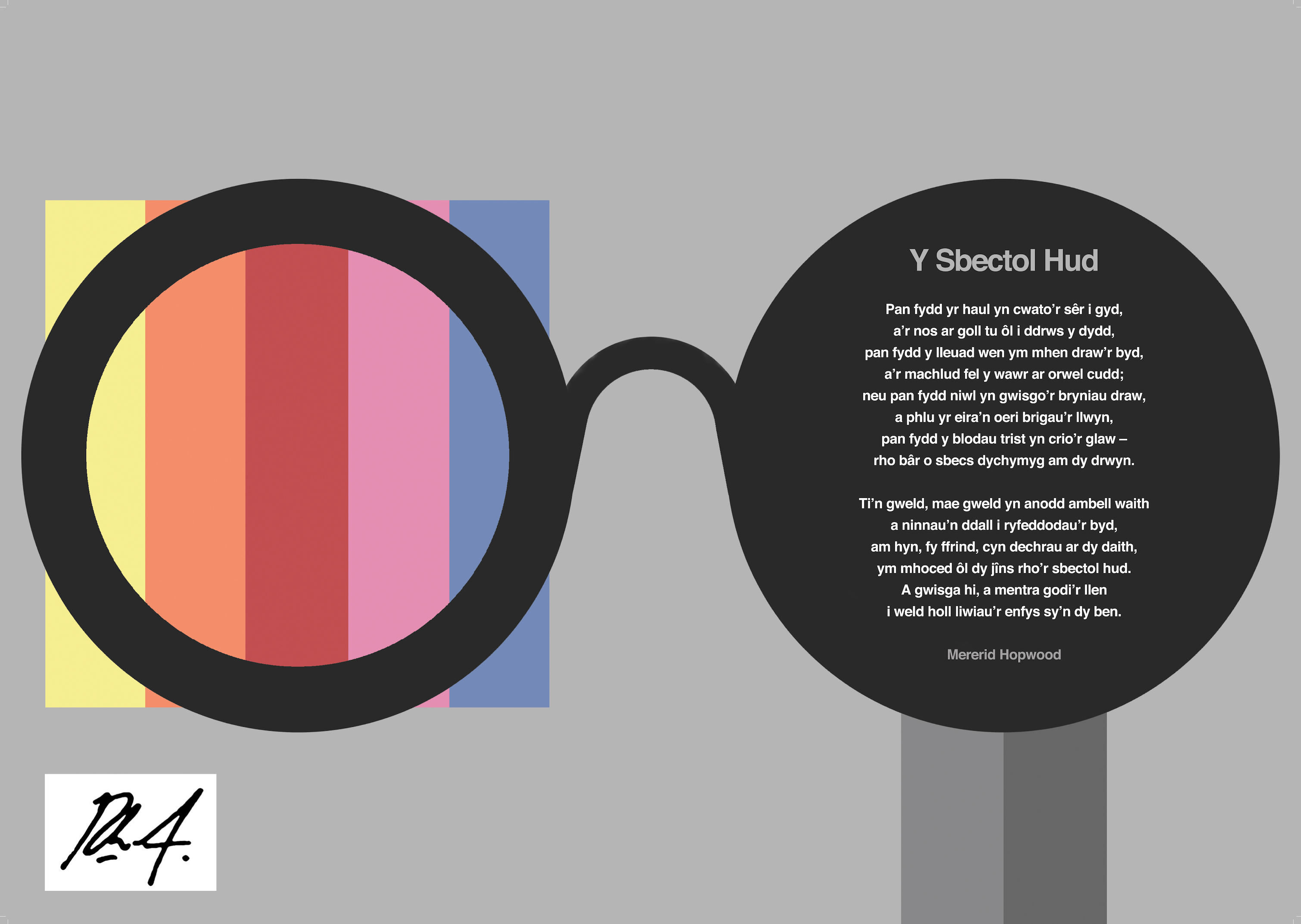 Poster Rhys Aneurin o'r gerdd "Y Sbectol Hud" gan Mererid Hopwood